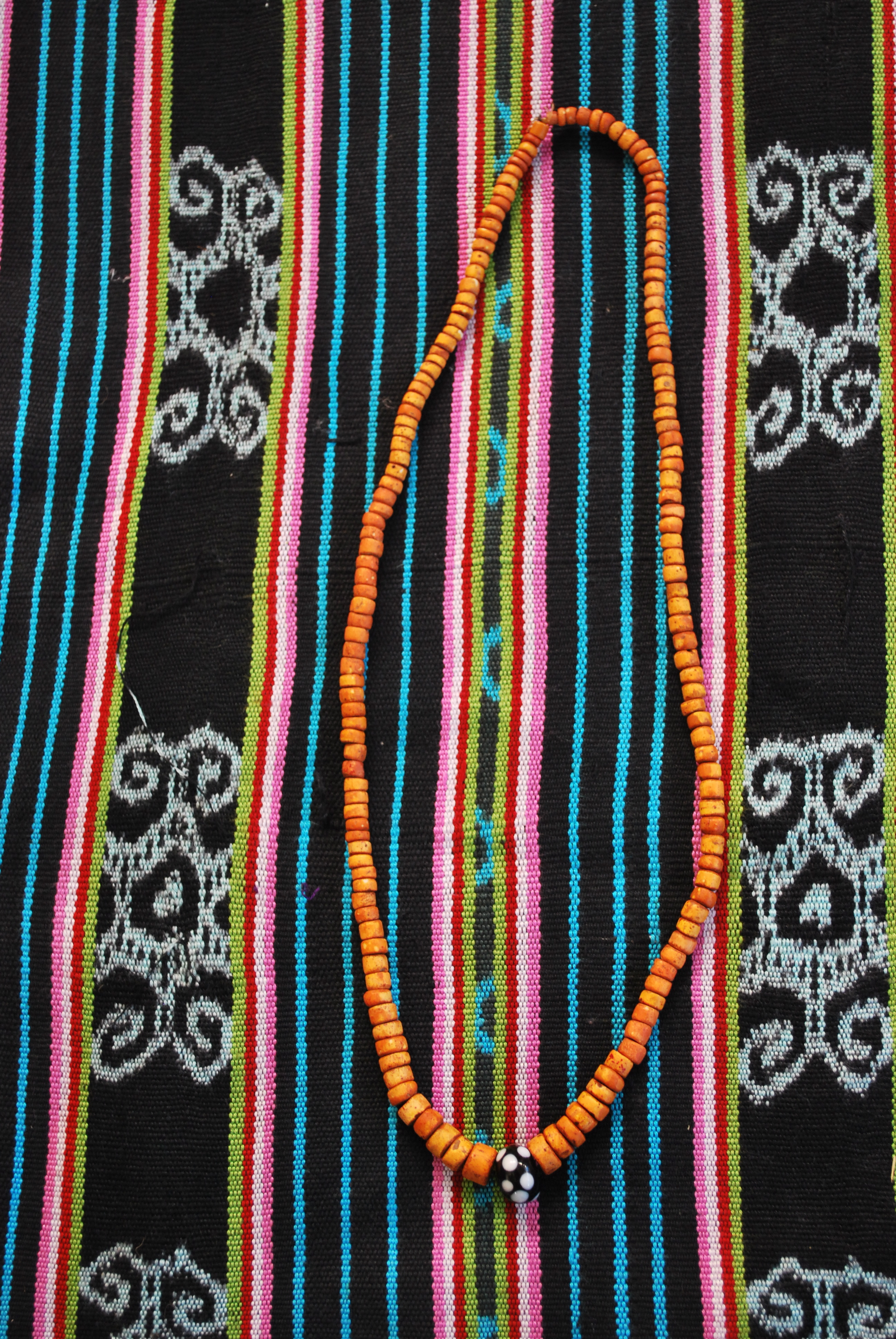 Halskette von Tänzerinnen in Viqueque. Die Ketten werden mutissalas genannt, die Steine mortel.